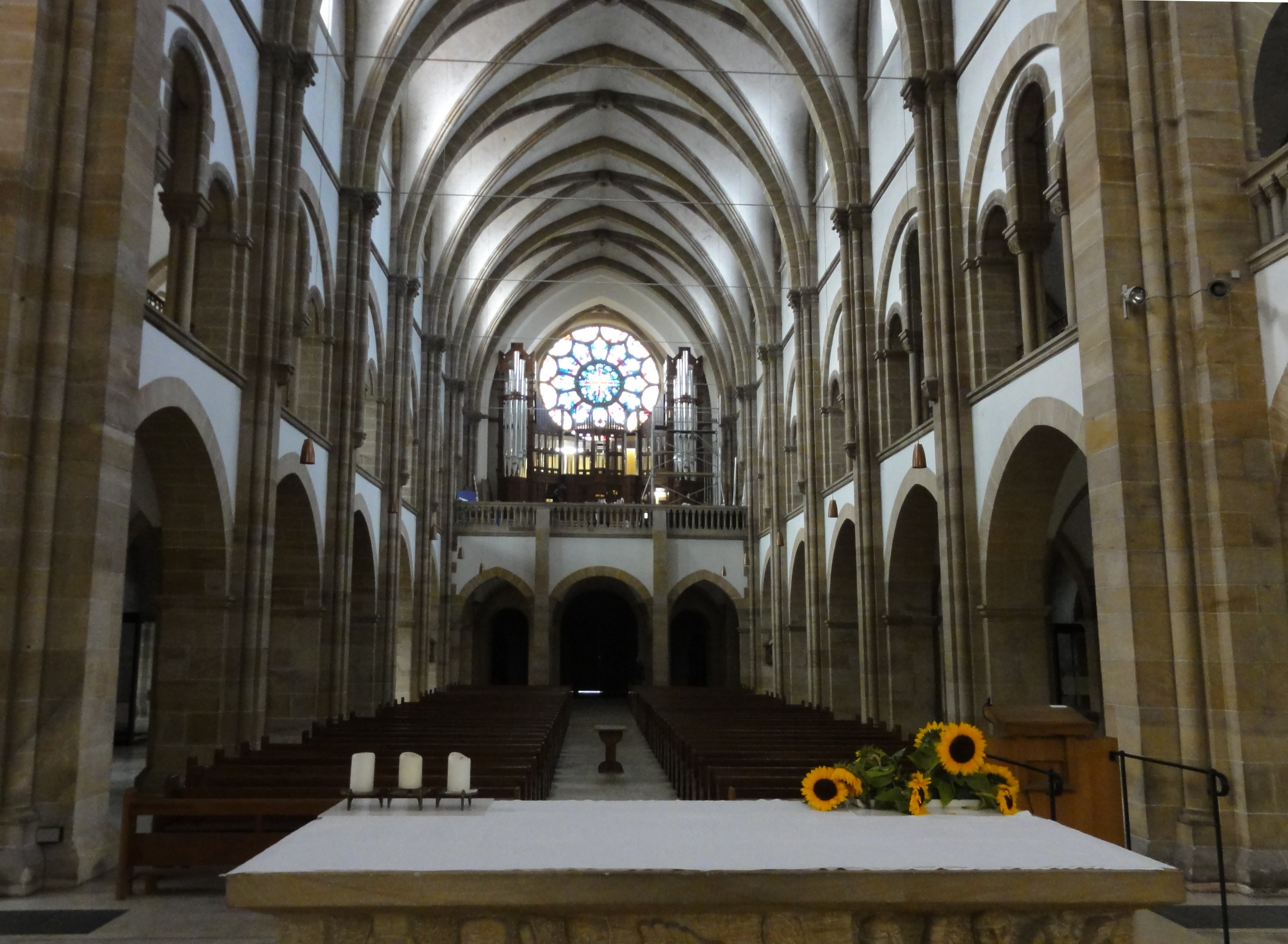 Rheinland-Pfalz, Landau in der Pfalz, Marienkirche